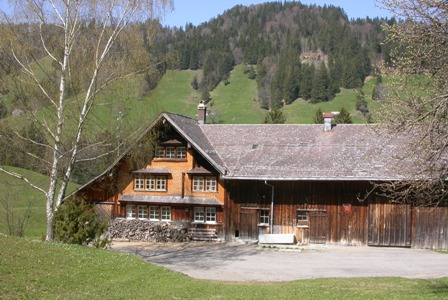 Hof bei Lichtensteig, wo Ulrich Bräker seine Jugendjahre verbrachte